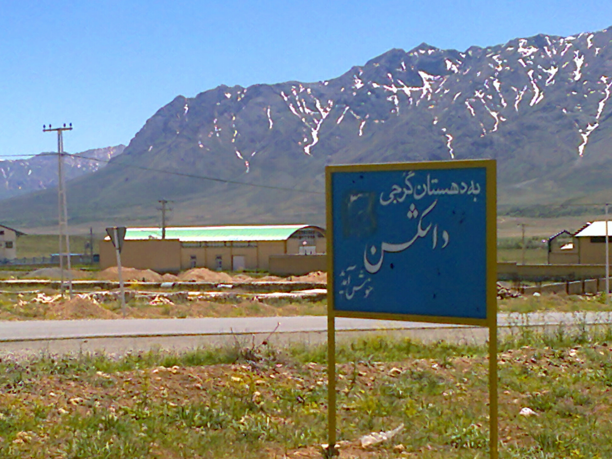 تابلو خوش آمد گویی روستای داشکسن